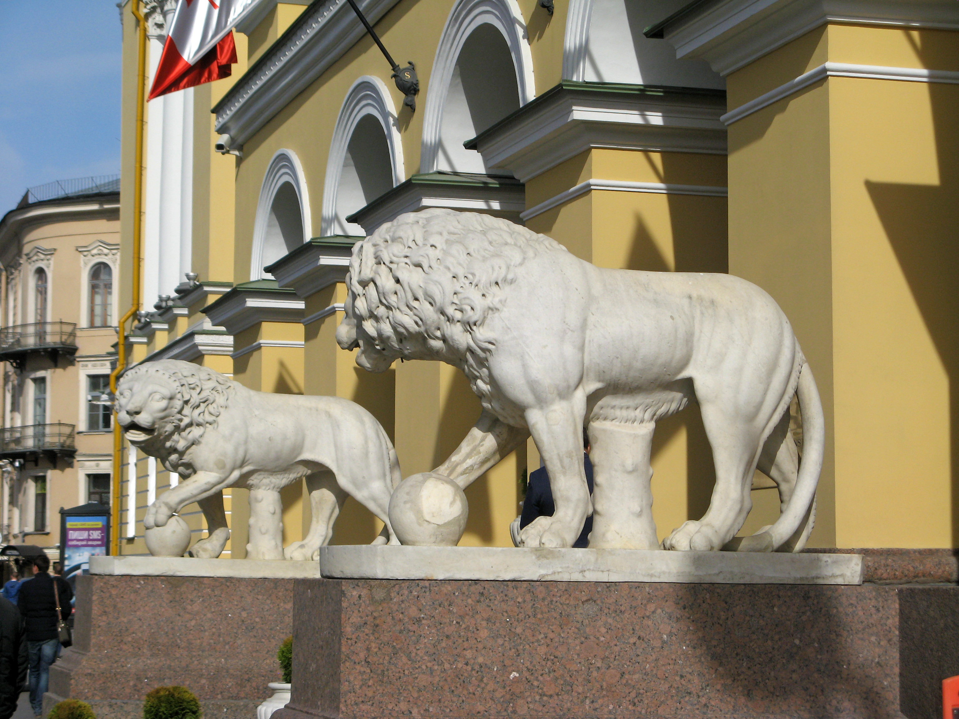 Дом А.Я. Лобанова-Ростовского: Исаакиевская площадь, 2, Адмиралтейский проспект, 12, Вознесенский проспект, 1, Адмиралтейский район, Санкт-Петербург